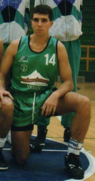 Miguel González